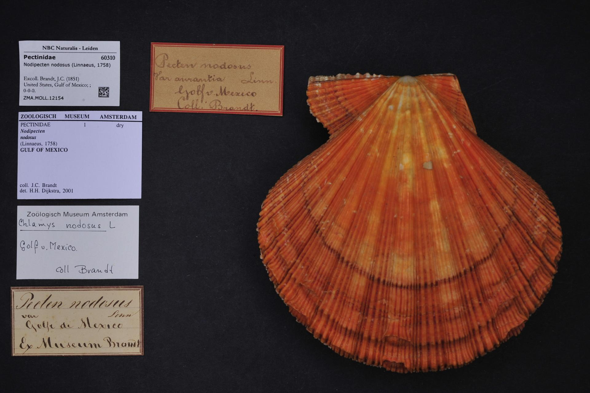 Nodipecten nodosus (Linnaeus, 1758)